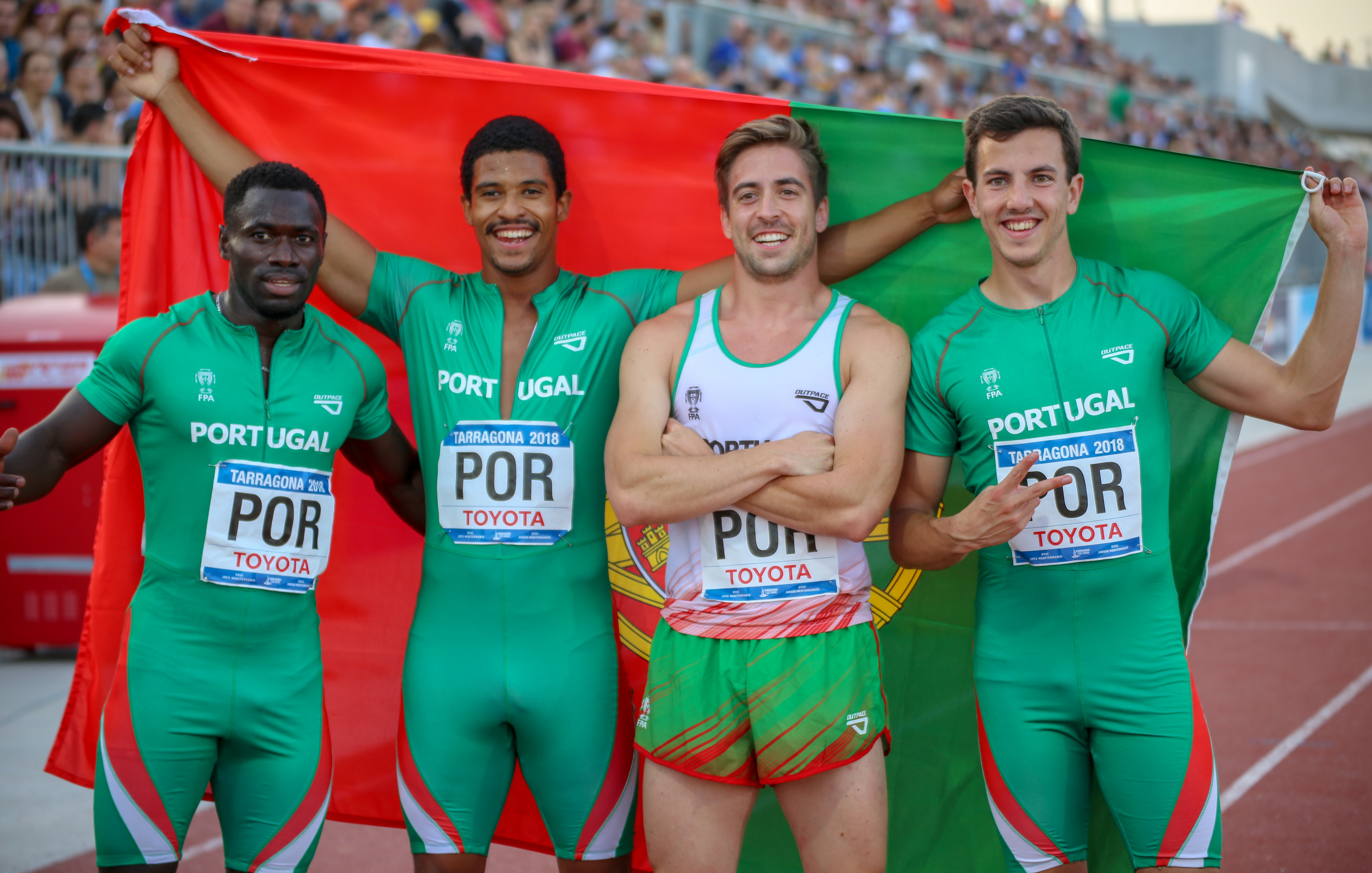 Portugal en los relevos 4x100 en los Juegos del Mediterráneo 2018 (Ancuiam Lopes, José Pedro Lopes, Diogo Antunes, Rafael Jorge )